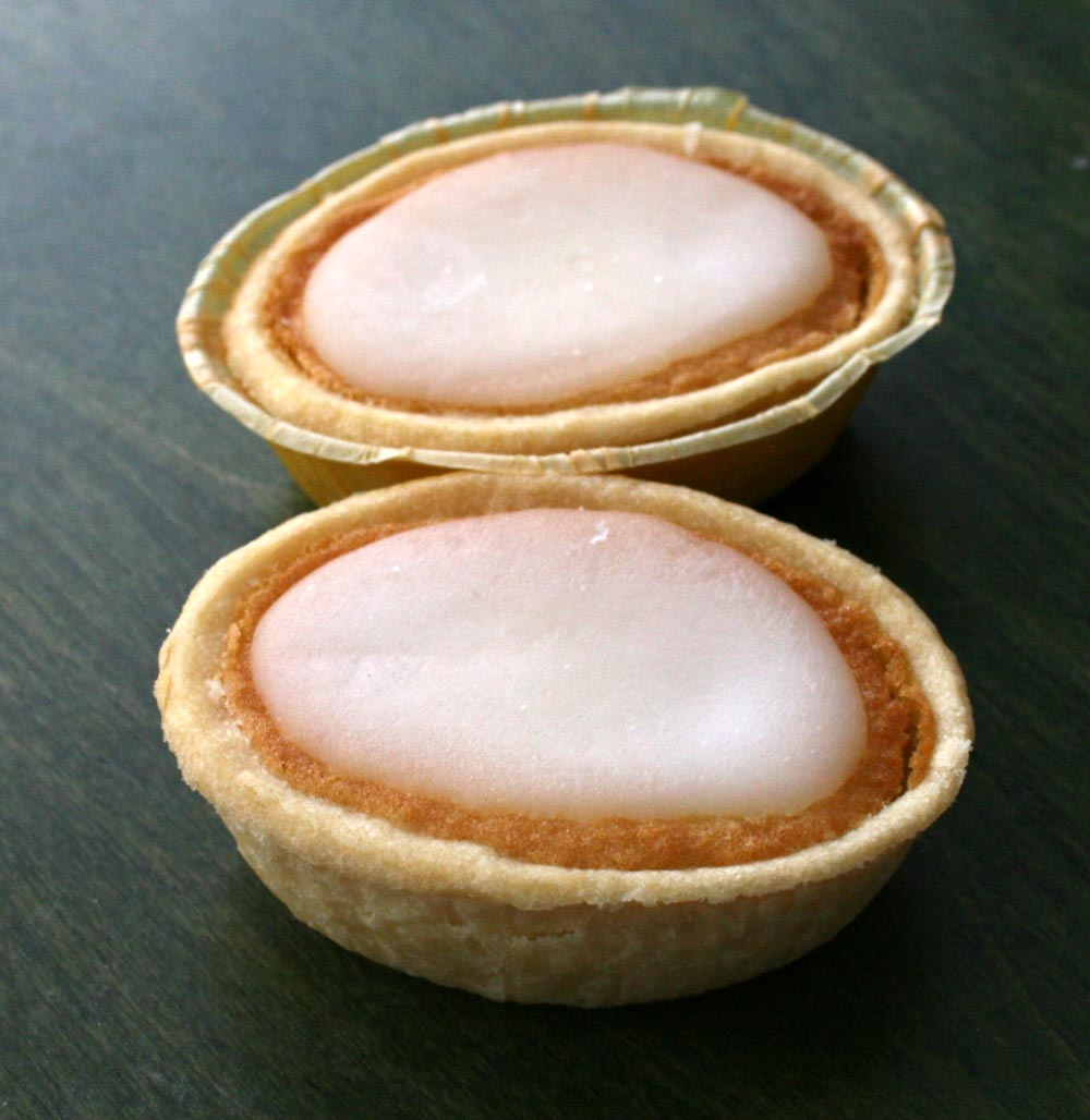 mazarin